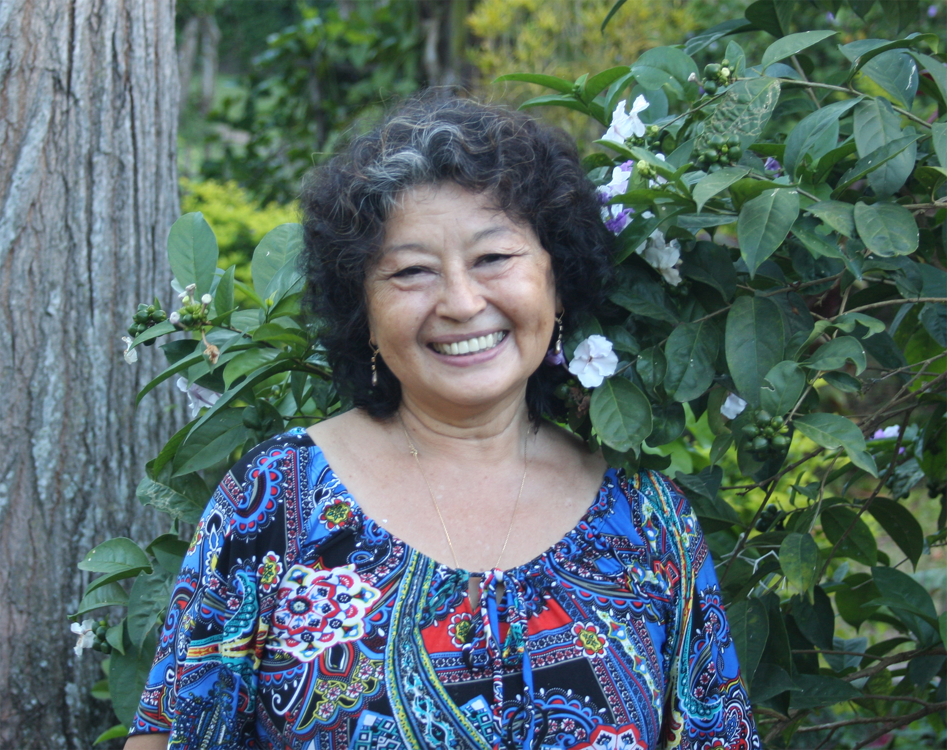 Hotel Río Shilcayo - Tarapoto - Perú, durante el evento VIII Foro Internacional del CISEI “Sanación, Ritualidad y Vida Cotidiana”